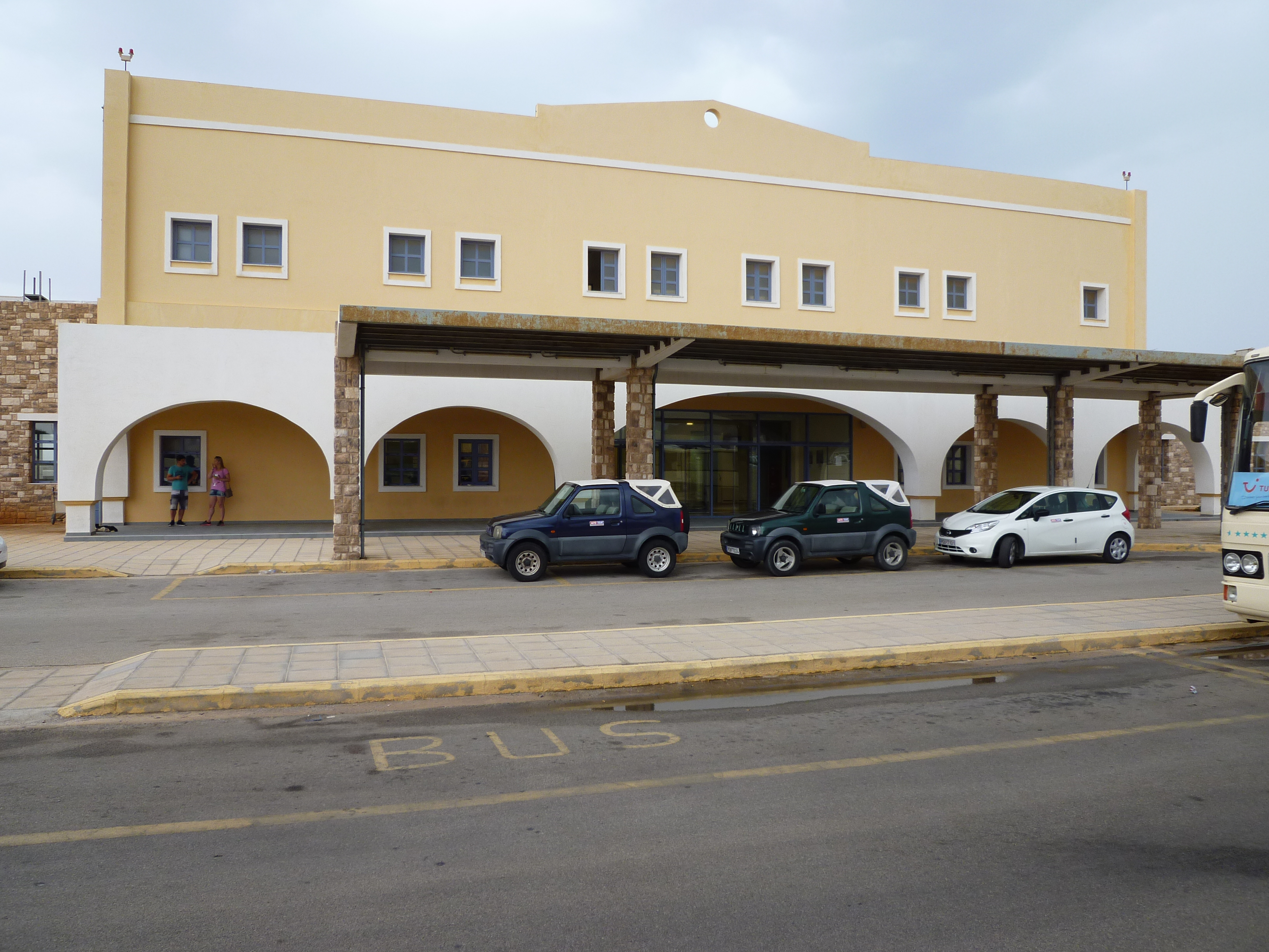 Das Flughafengebäude auf der griechischen Insel Karpathos.